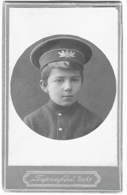 Валик В.С. 1906 г.